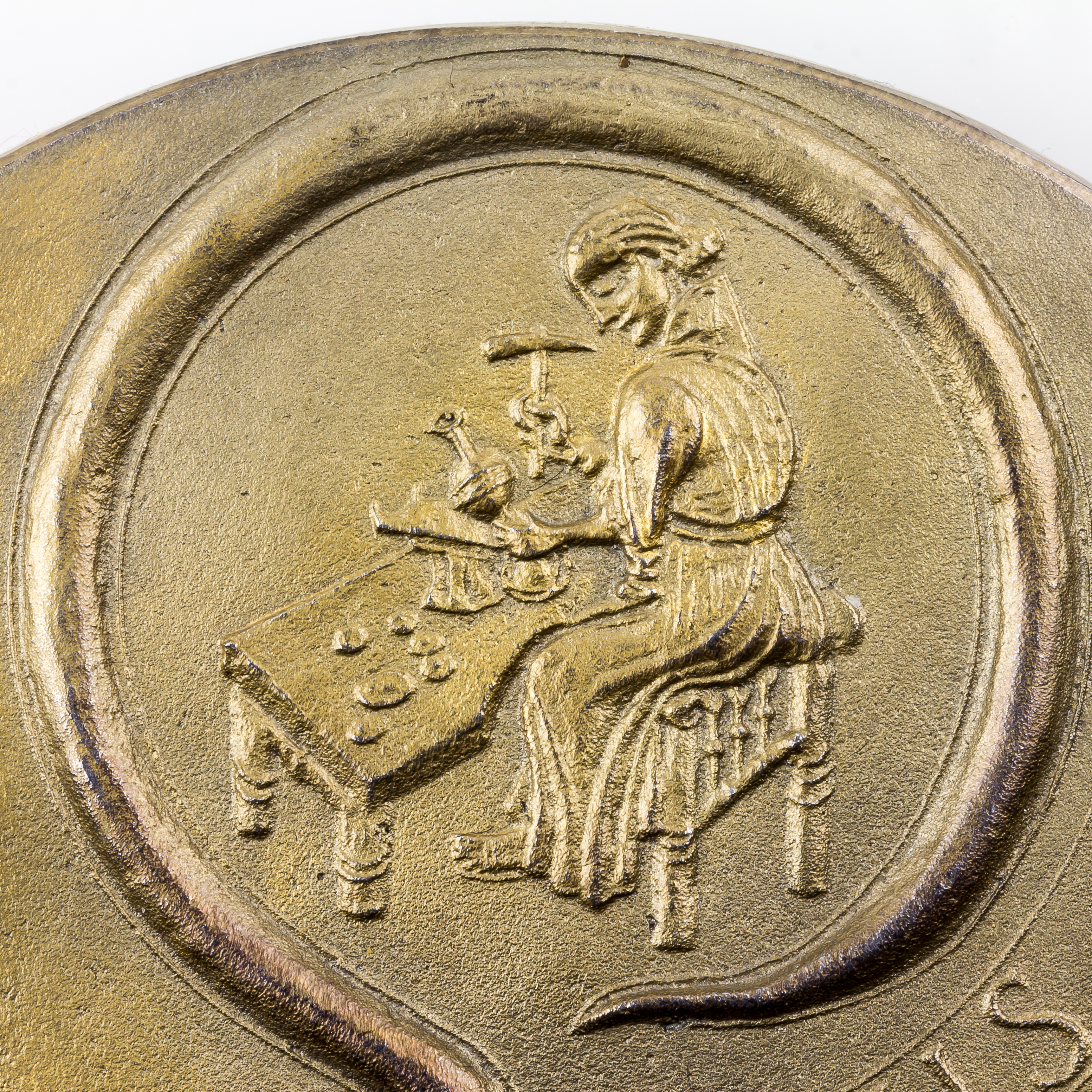 Eligiuspreis-Medaille